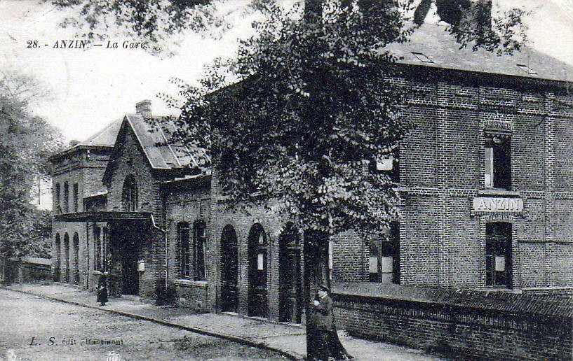 Carte postale ancienne éditée par L.S., éditeur à Hautmont, n°28 : ANZIN - La gare La gare d'Anzin fut construite et exploitée par l'ancienne Compagnie des Mines d'Anzin